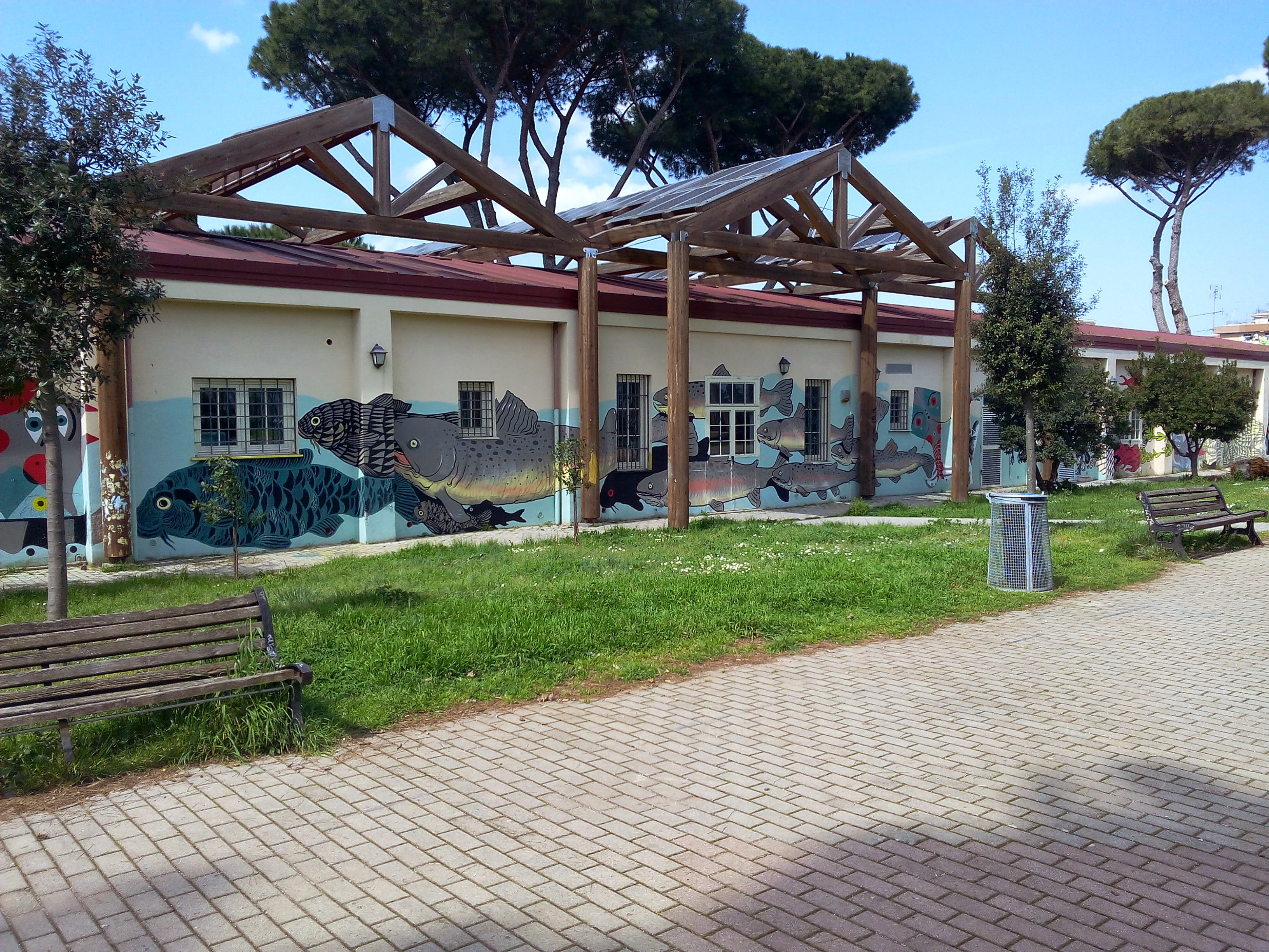 Visure Acatastali a Torpignattara il 24 marzo 2015